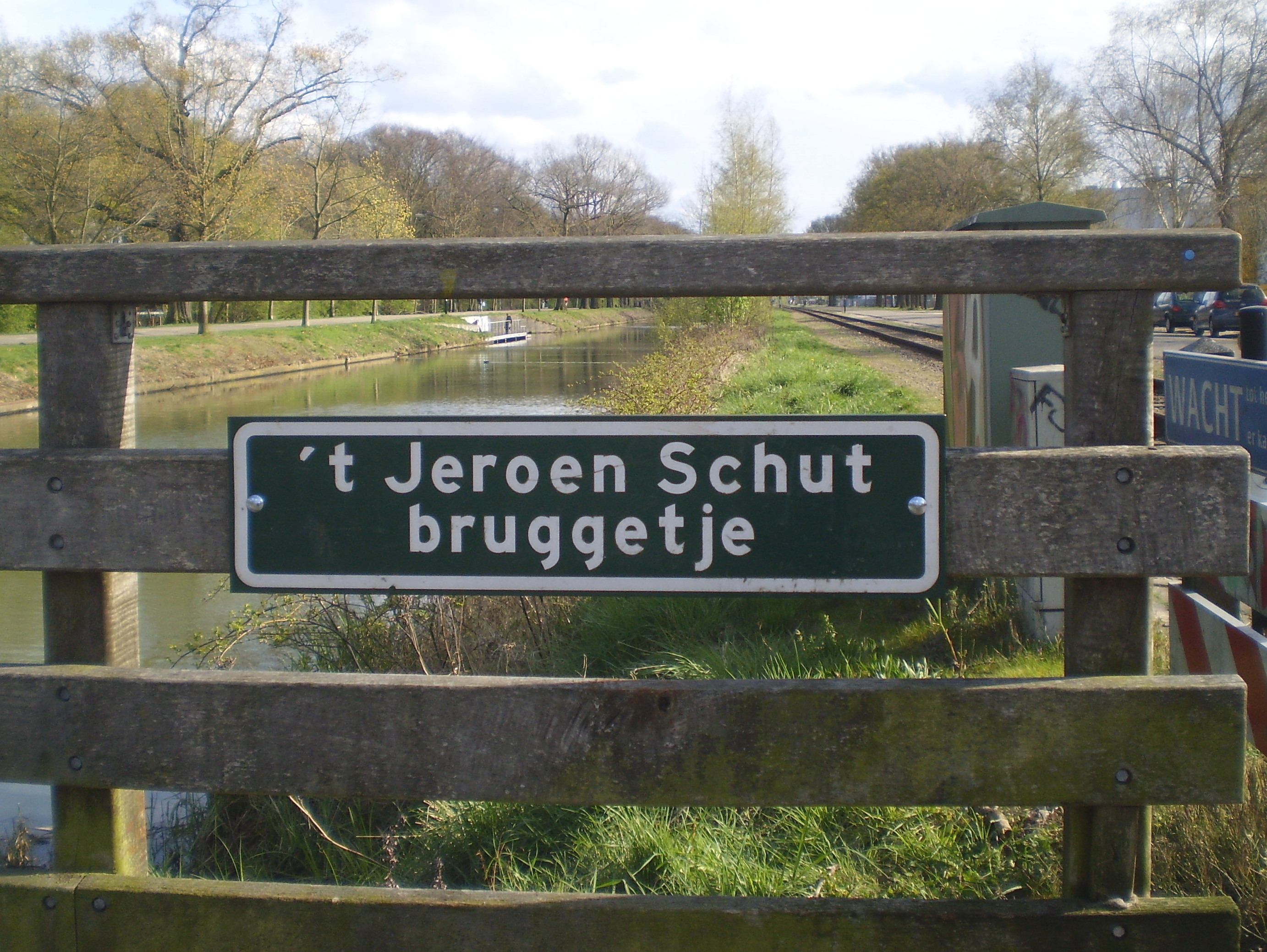 Naambord ter nagedachtenis aan de 12-jarige Jeroen Schut, die in november 2000 om het leven kwam bij een aanrijding door een trein direct naast deze fietsbrug in Apeldoorn over het Apeldoorns Kanaal